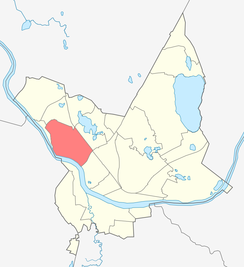 Микрорайон Крепость карте Даугавпилса.